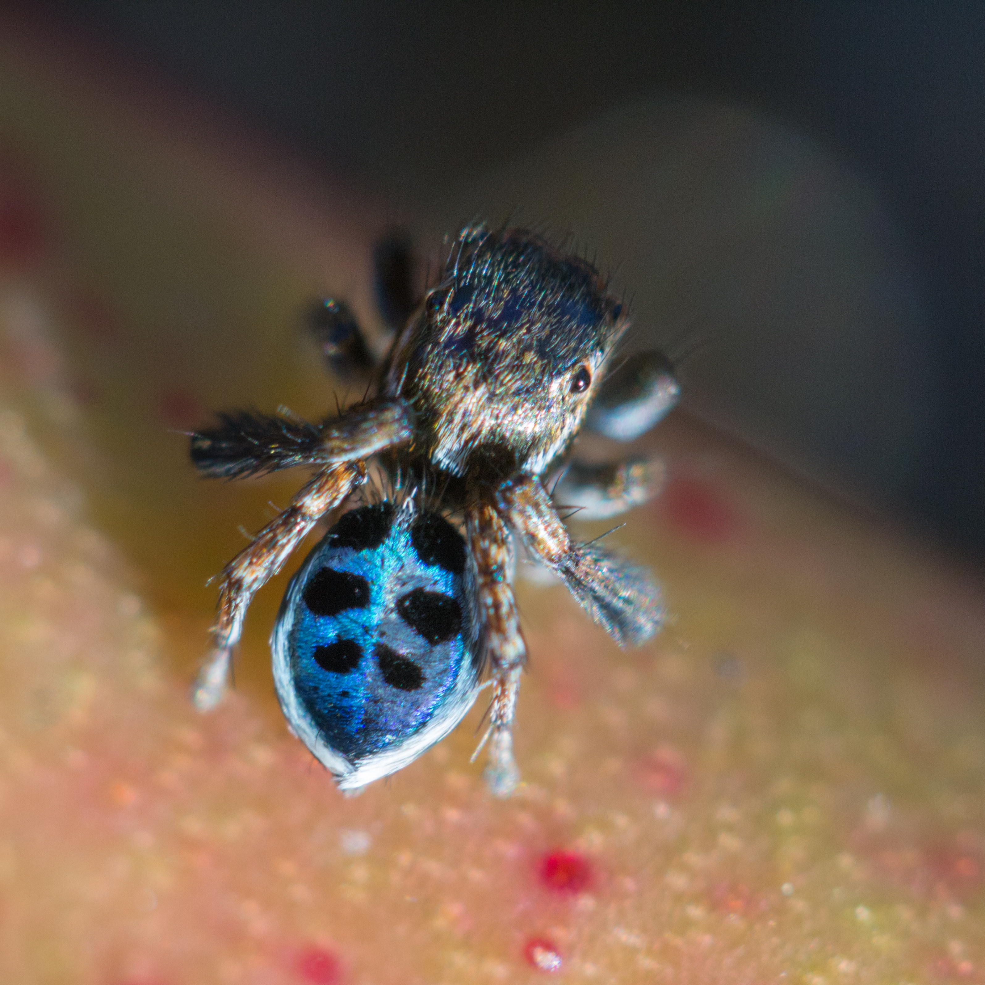 A male peacock jumping spider